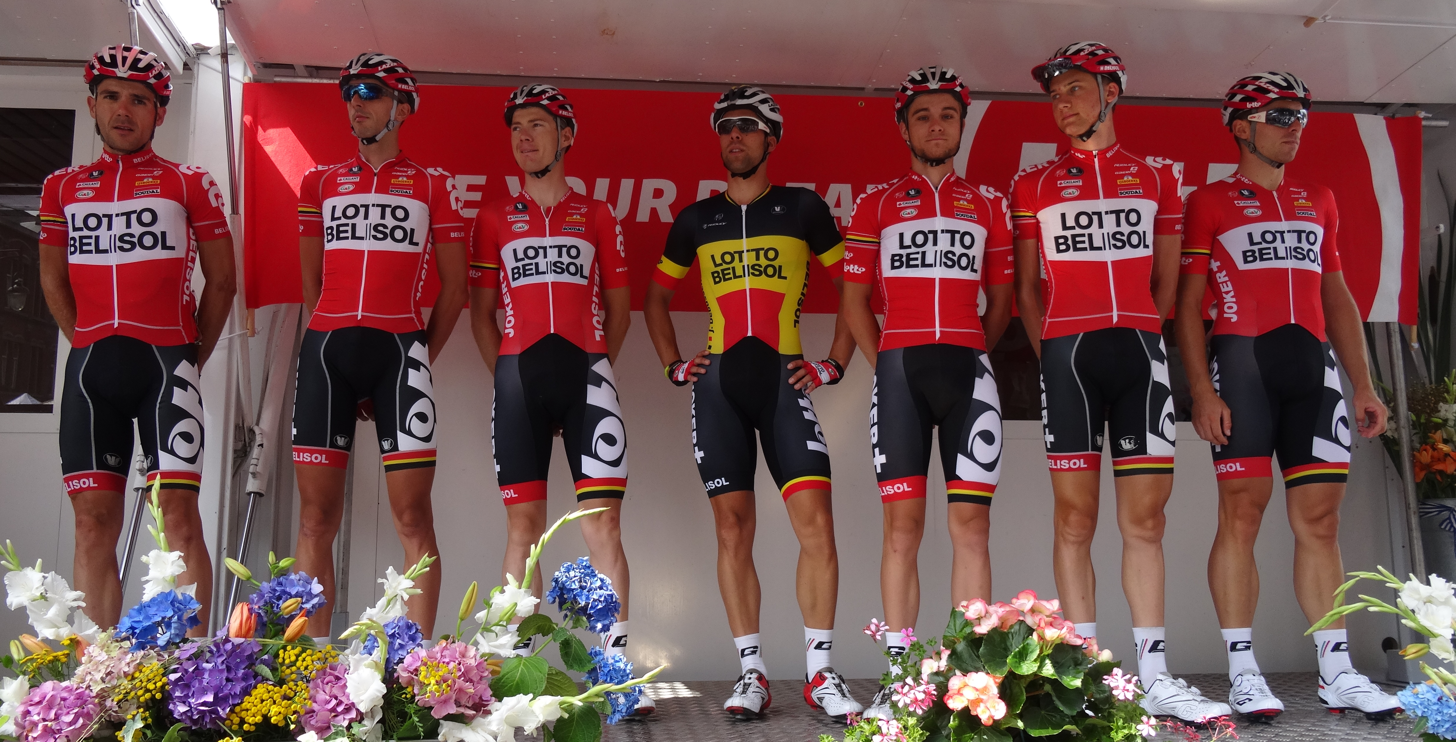 Reportage photographique réalisé le samedi 26 juillet à l'occasion du départ de la première étape du Tour de Wallonie 2014 à Frasnes-lez-Anvaing, Belgique.